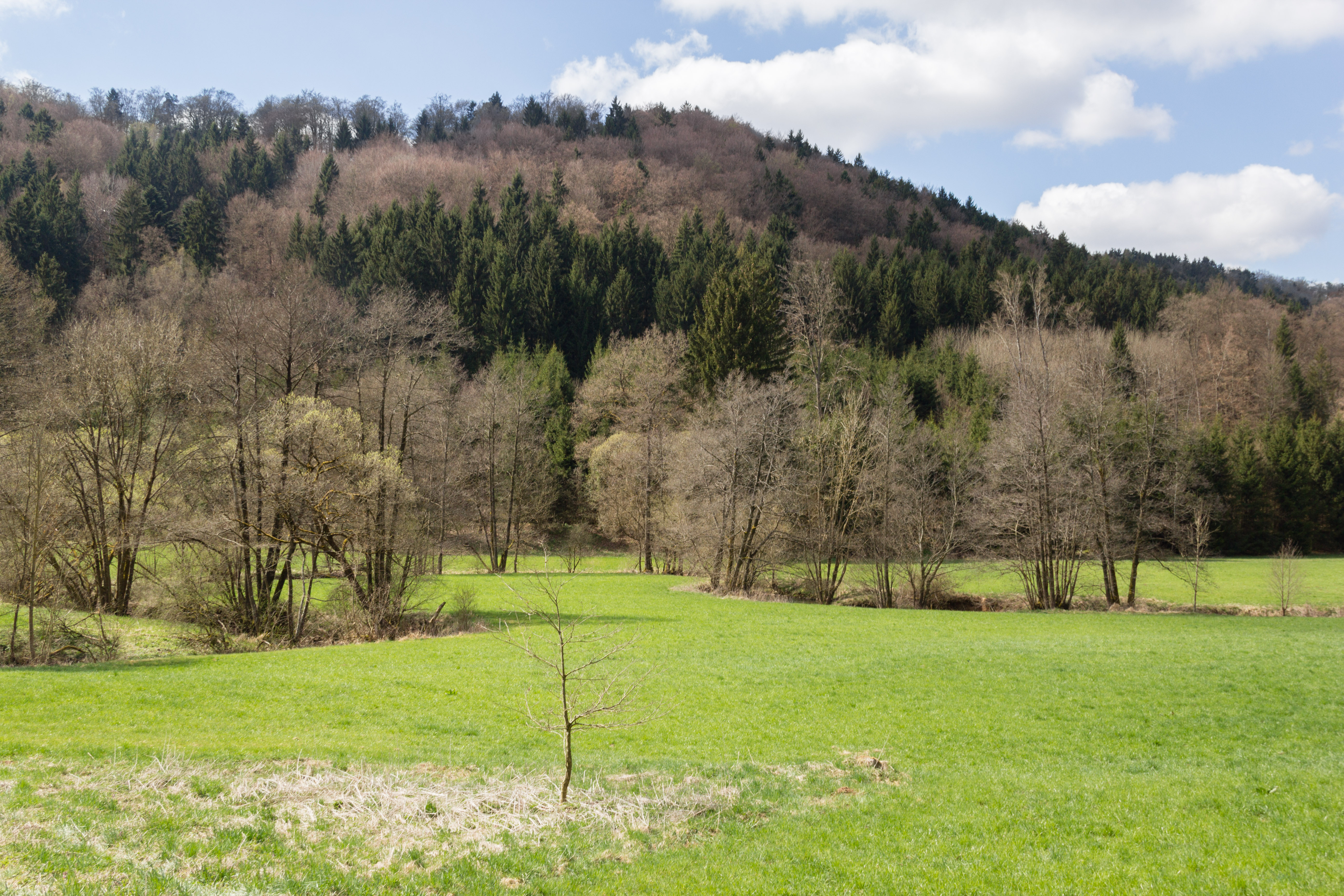 Weiße Laber, Dietfurt, Naturpark Altmühltal